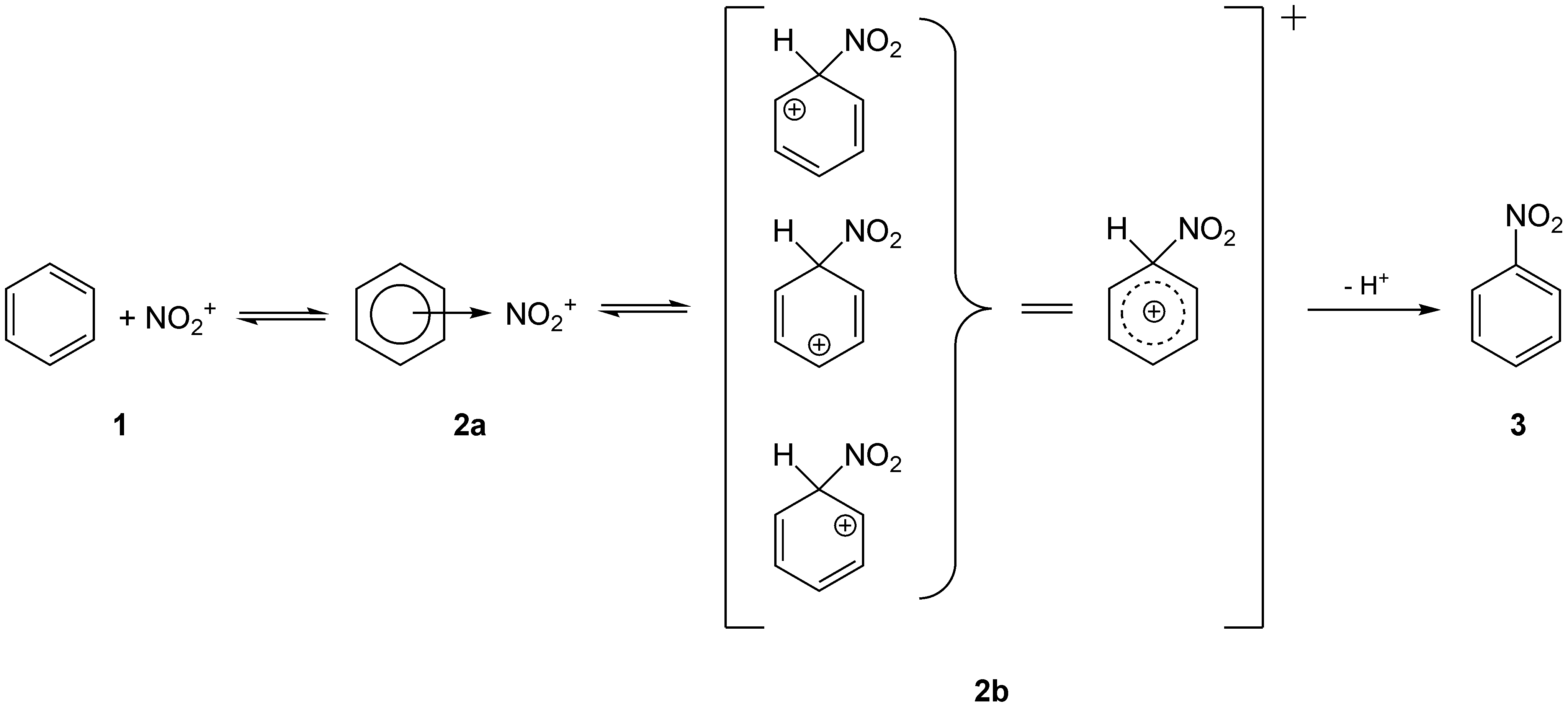 Nitrierung von Benzol